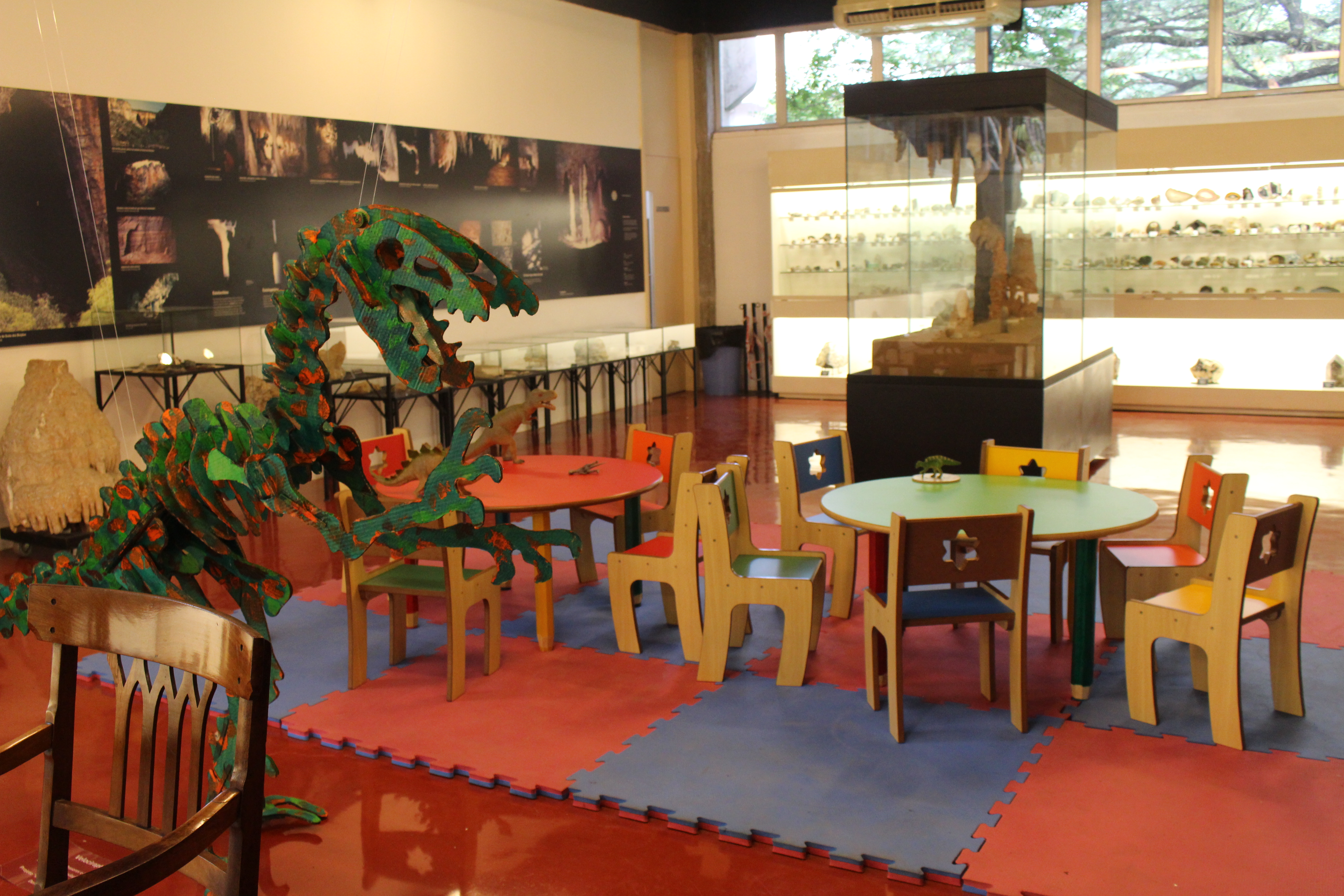 Espaço didático infantil - Museu de Geociências do Instituto de Geociências da USP